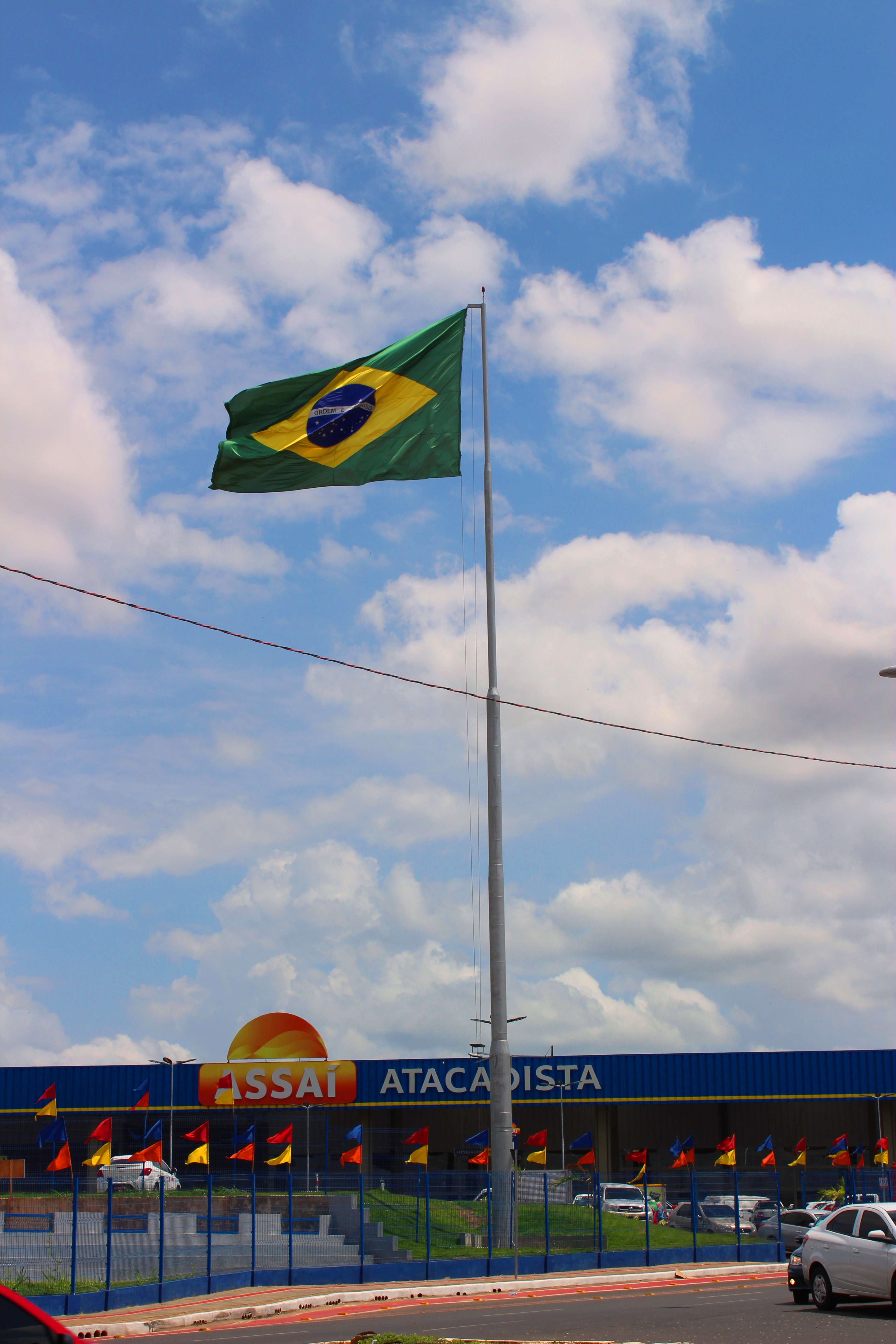 Vista de uma loja do Assaí Atacadista, em Teresina, no Piauí, com um grande mastro com a bandeira do Brasil.